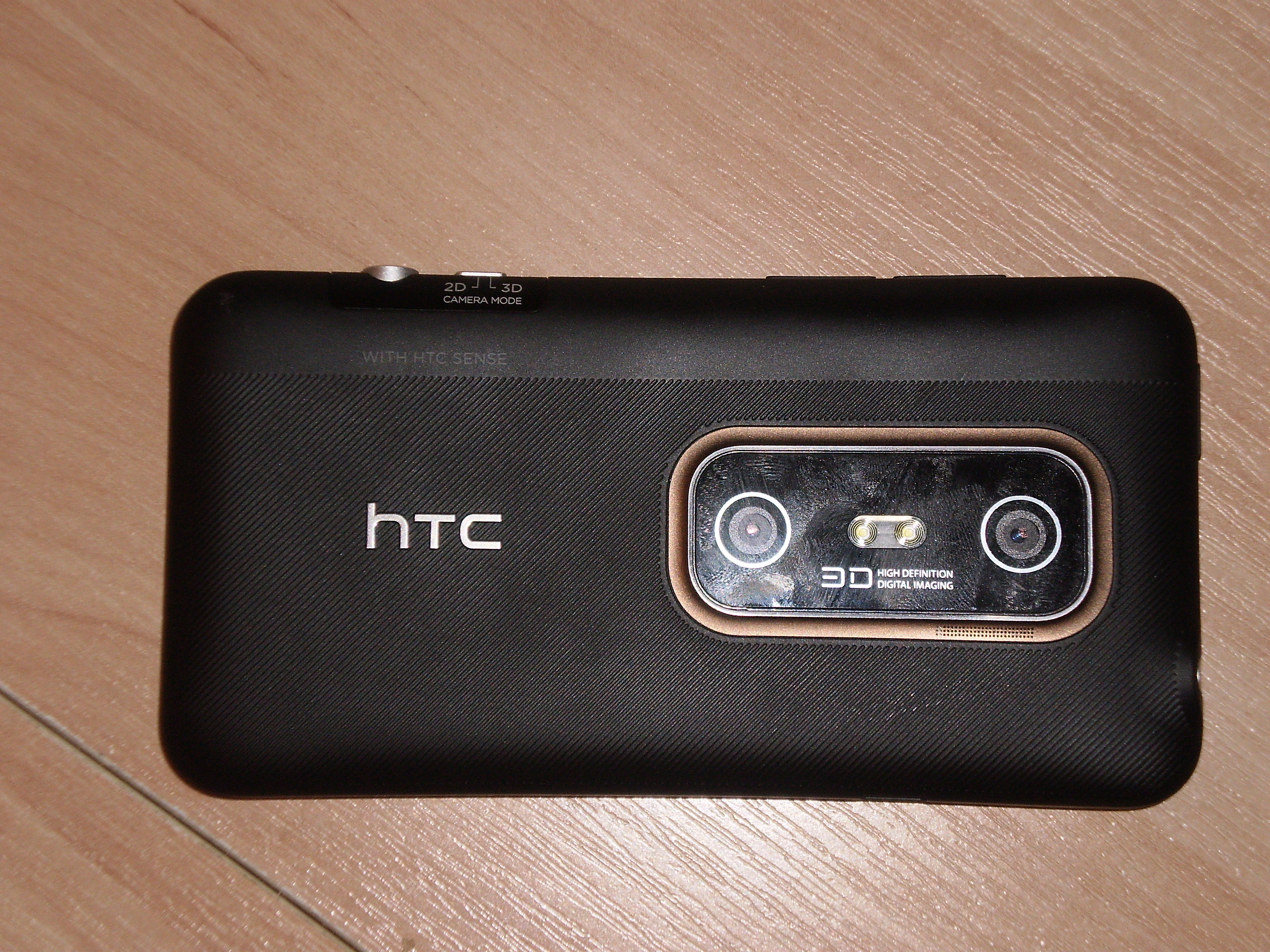 zadní strana u telefonu HTC EVO 3D, jdou vidět 2 kamery pro snímání ve 3D